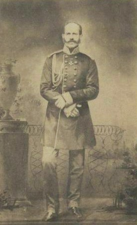 Граф Алекса́ндр Григо́рьевич Стро́ганов (1795 — 1891)